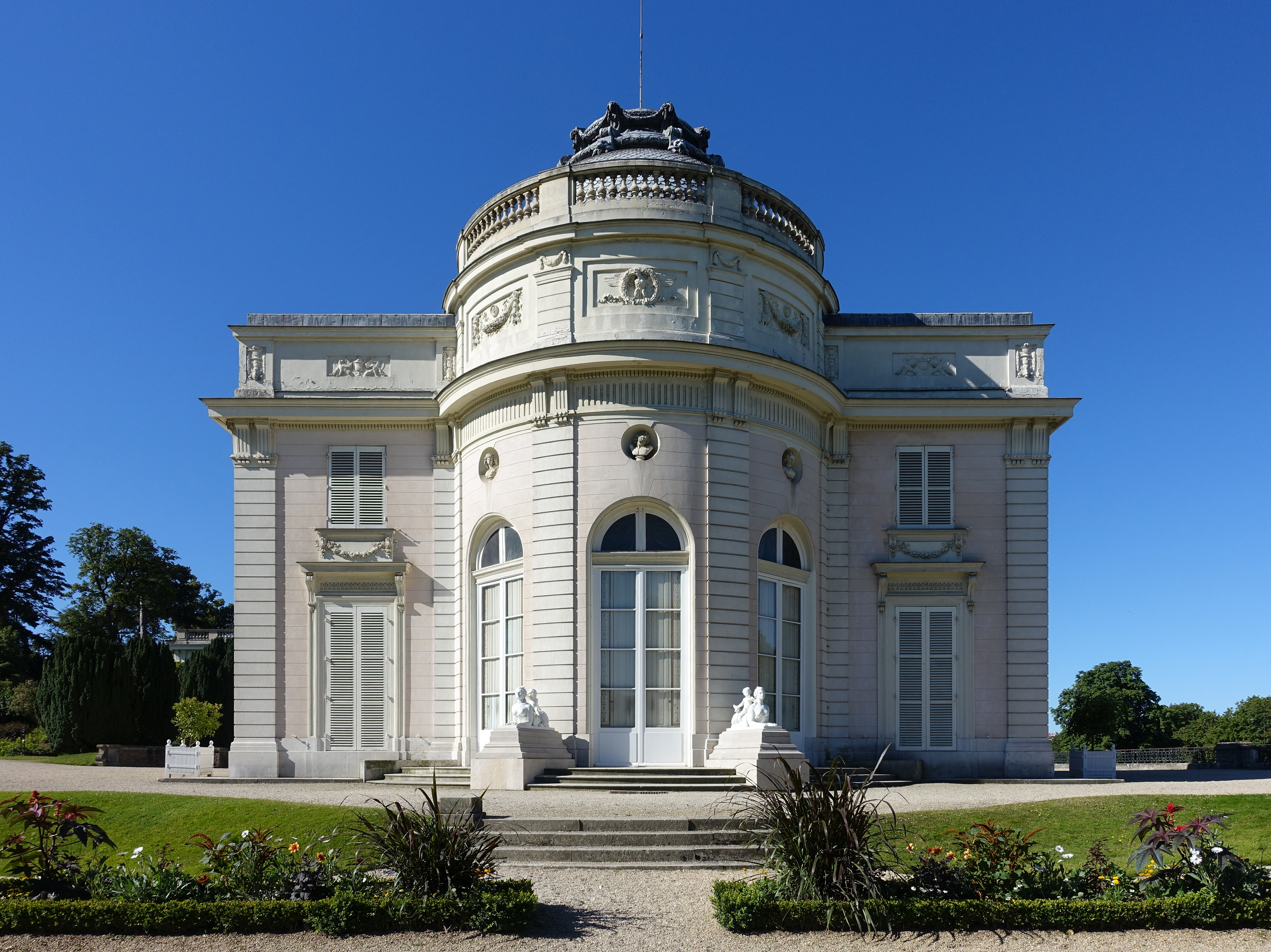 Parc de Bagatelle @ Paris